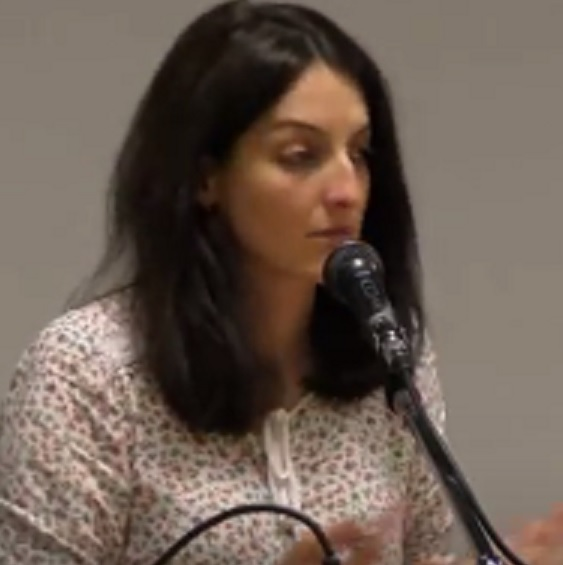 Myriam Benraad lors de la conférence « Un chaos sans fin » organisée par le CML à Toulon le 1er février 2016